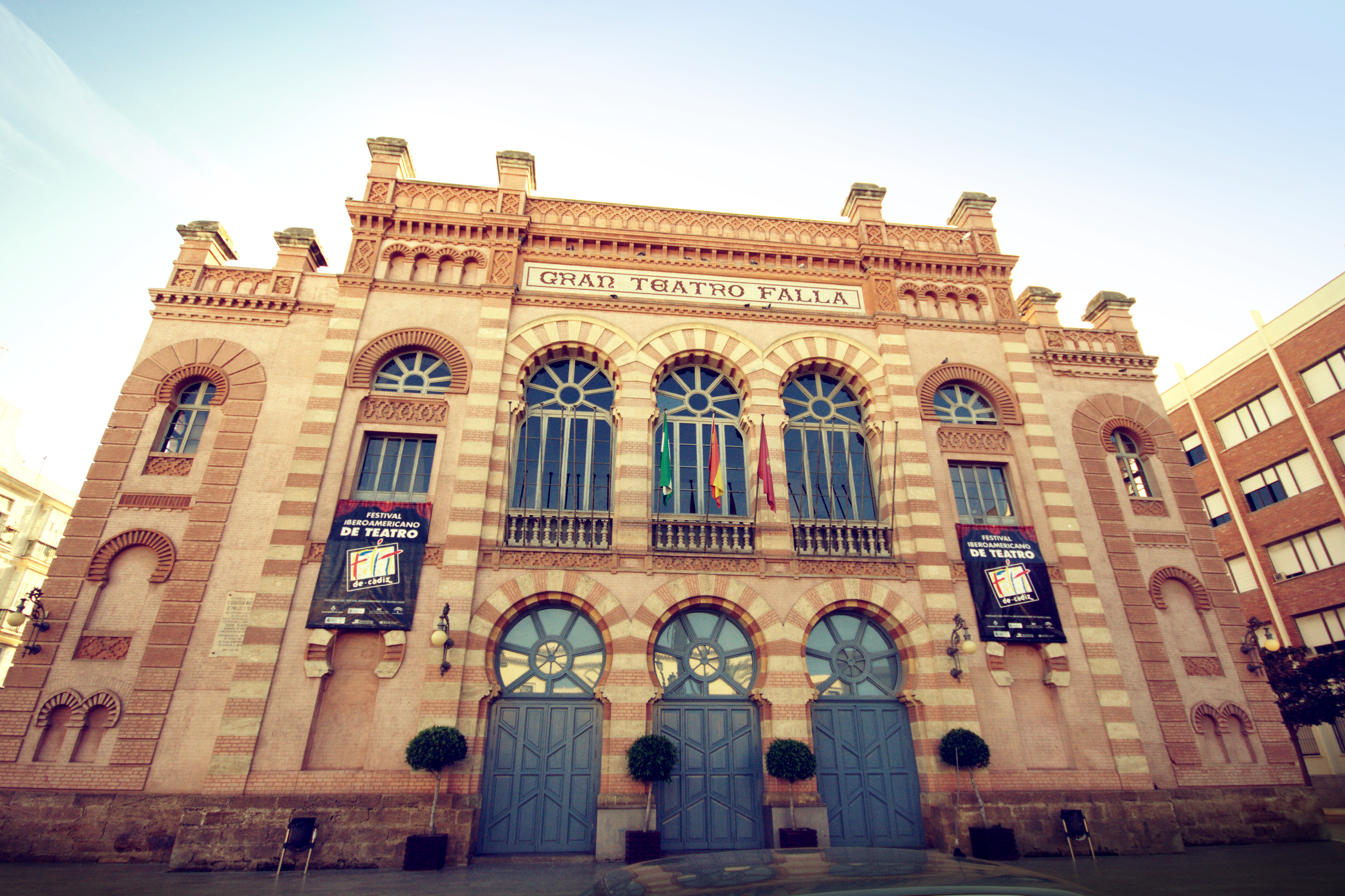 Gran Teatro Falla de Cádiz con carteles anunciadores del FIT (Festival Iberoamericano de Teatro).